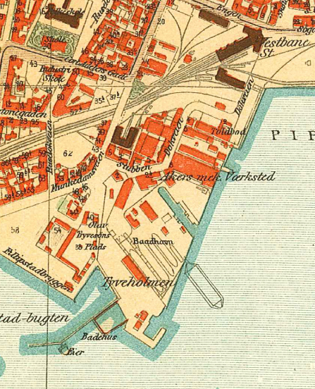 Kart over Aker Brygge og Tjuvholmen, 1917.